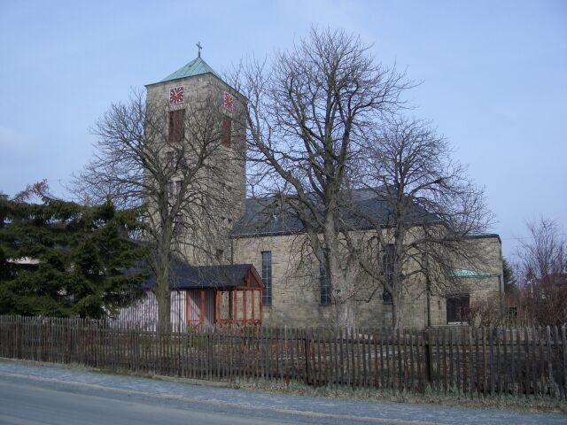 Auferstehungskirche Hof